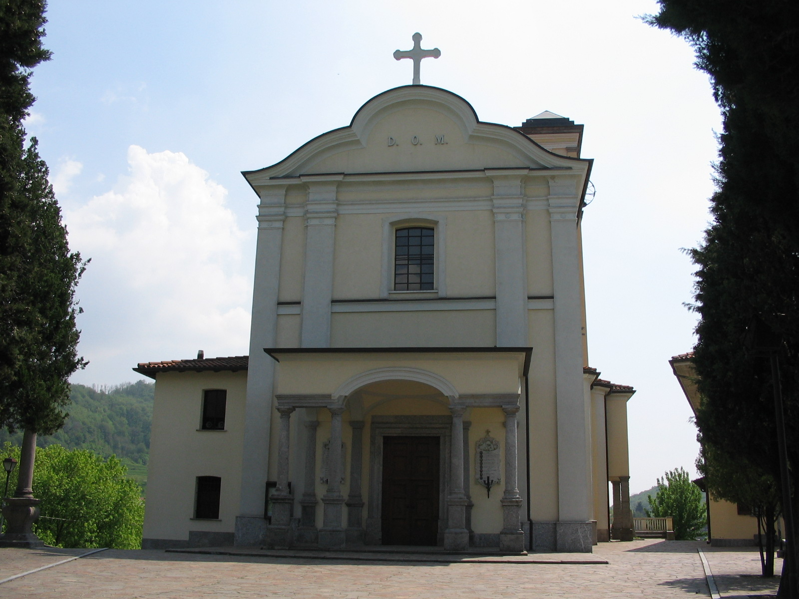 Autore Giorces. Monte Marenzo, la Parrocchiale.